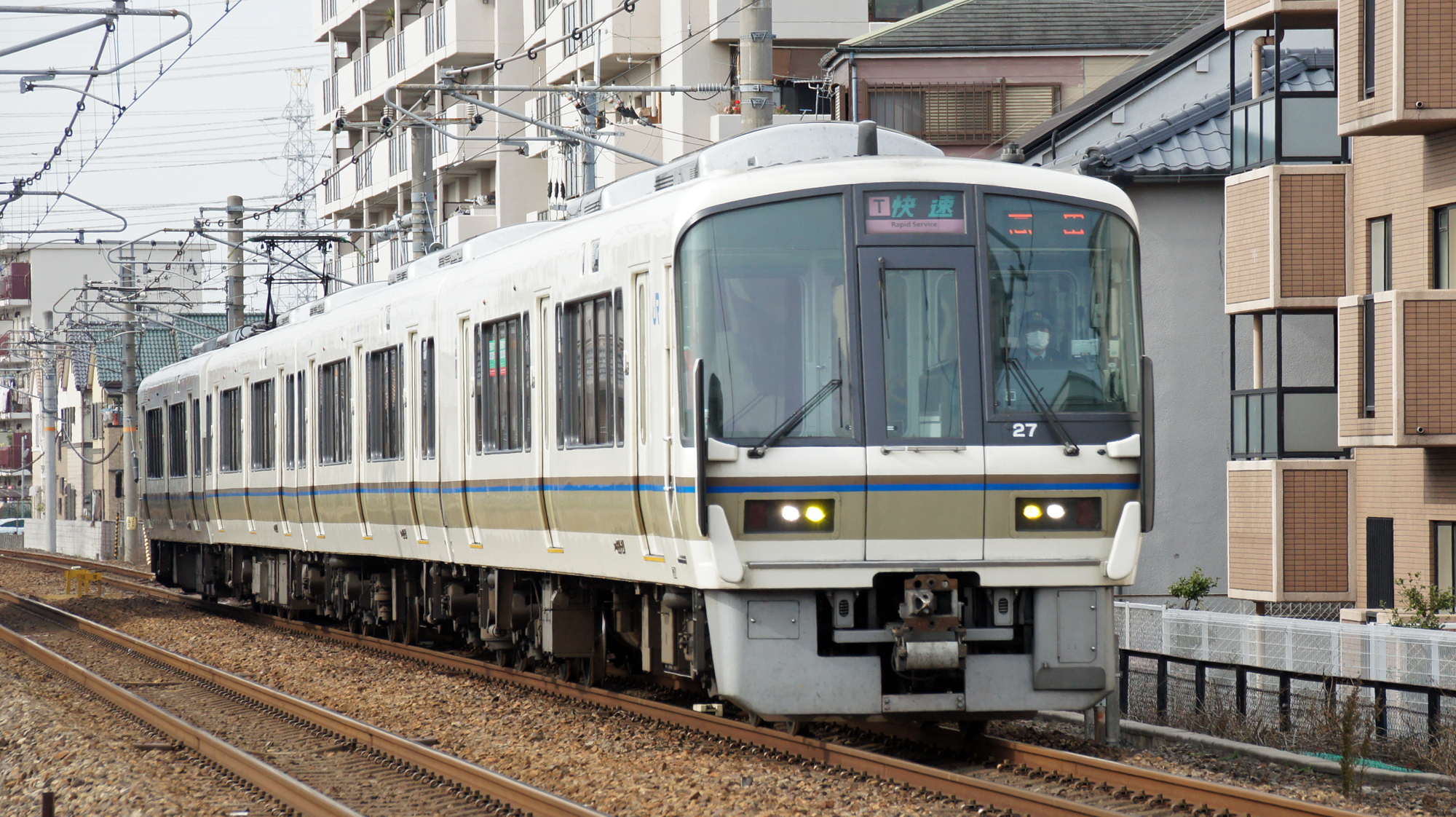 221系による大和路線の快速 高田行